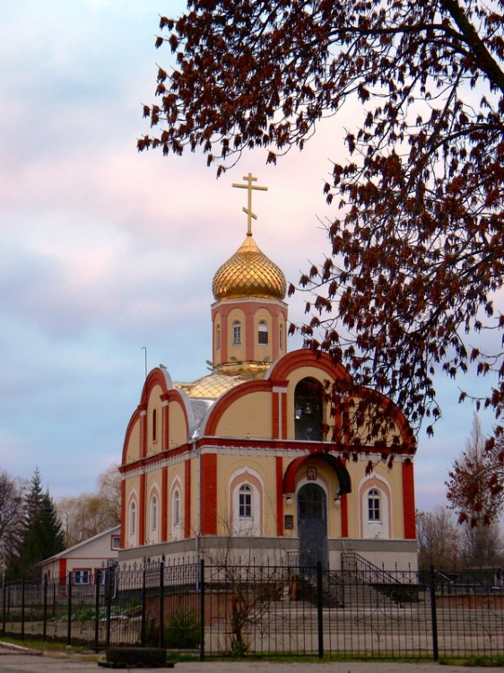 Купино. Церковь Николая Чудотворца (Свято-Никольский храм).